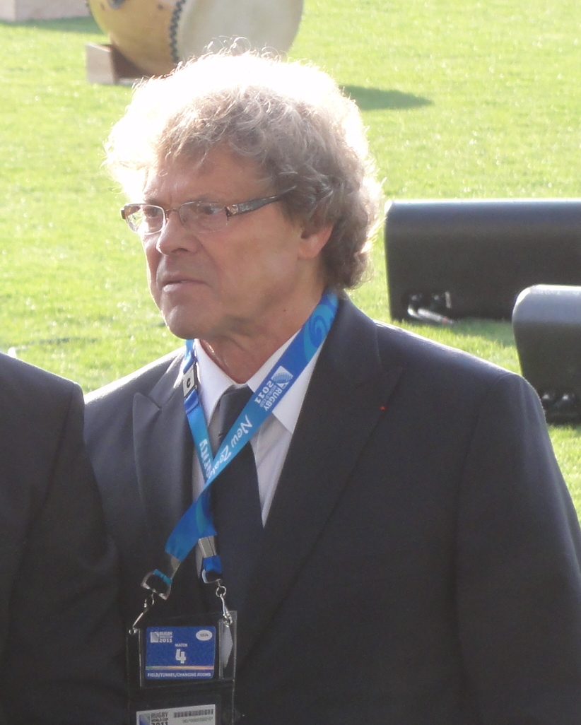 Jo Maso